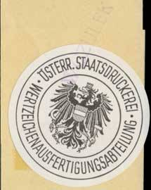 Sealing stamp Title: Österr. Staatsdruckerei Wertzeichenausfertigungsabteilung Description: Banderole mit Namensstempel Place: Wien size: 5 cm